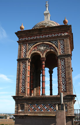 Parte superior del Palauet Nolla, con los mosaicos decorativos